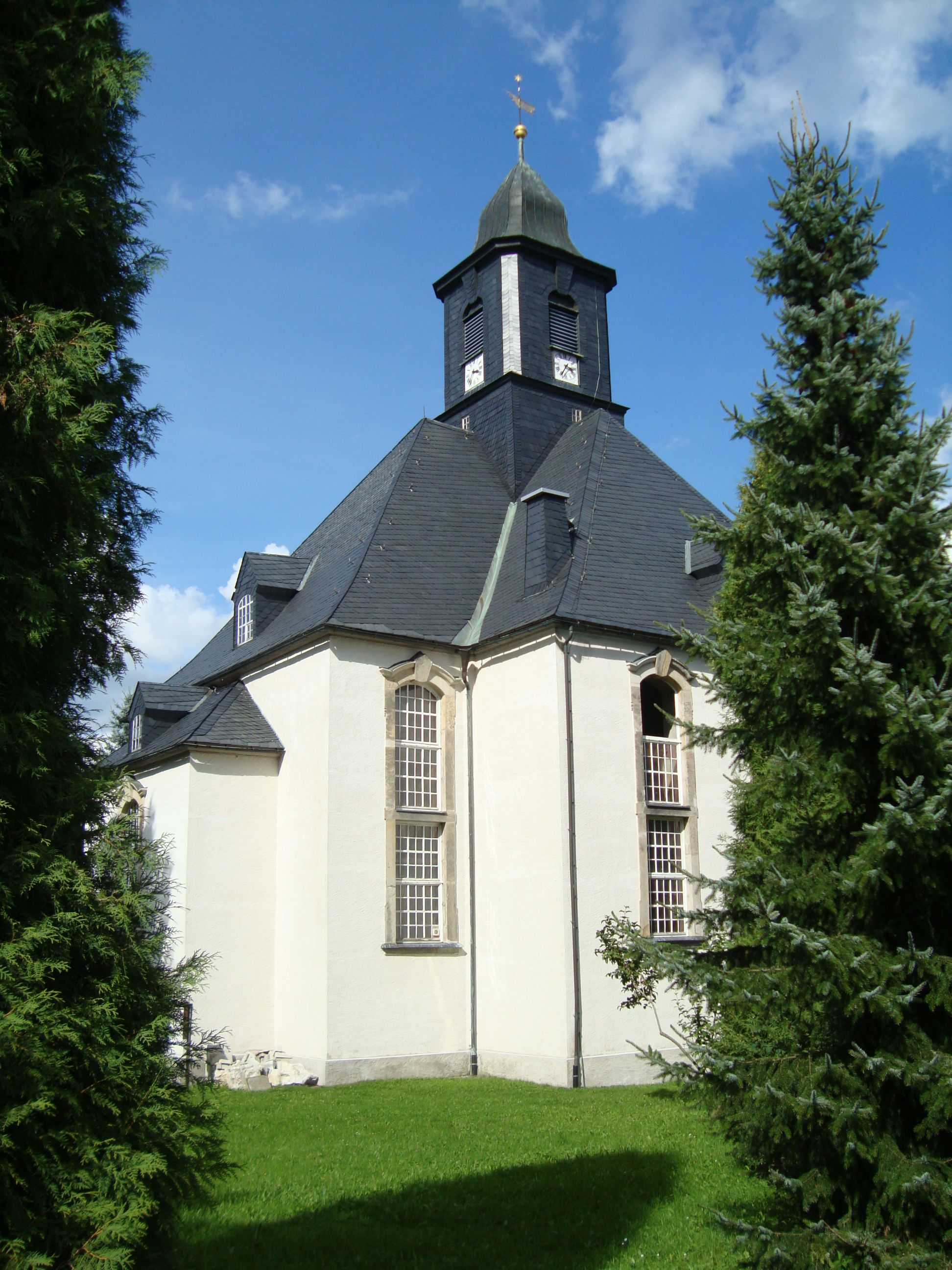 Kirche in Pockau OT Forchheim im Erzgebirge